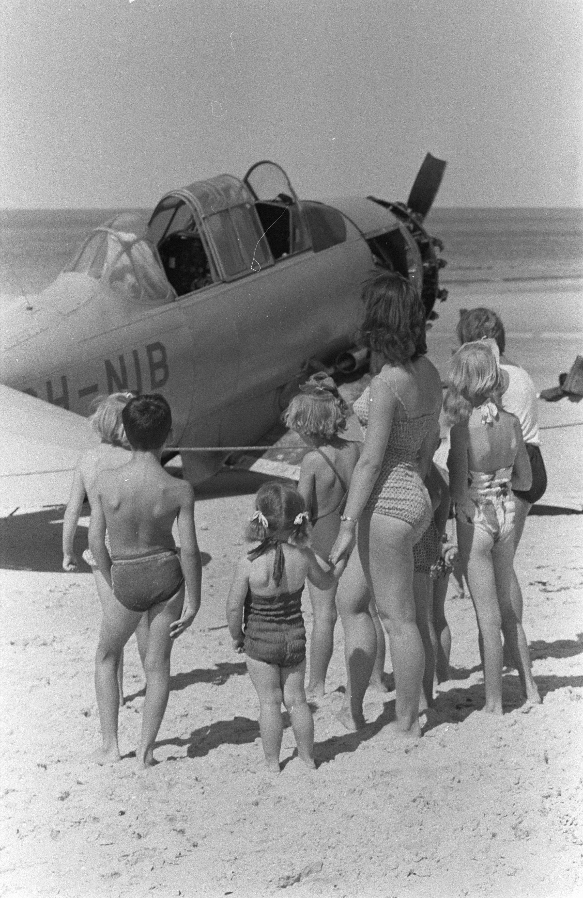 Collectie / Archief : Fotocollectie Anefo Reportage / Serie : [ onbekend ] Beschrijving : Beschadigde Harvard [PH-NIB] op het strand bij Julianadorp. Het vliegtuig kreeg tijdens schietoefeningen boven het Marsdiep tussen Den Helder en Texel een motorstoring. De piloot, B. de Geus uit Voorschoten, maakte een noodlanding in zee, maar eindigde toch op het strand Datum : 18 augustus 1959 Locatie : Julianadorp Trefwoorden : luchtvaart, ongevallen, stranden, vliegtuigen Persoonsnaam : Harvard Fotograaf : Pot, Harry / Anefo Auteursrechthebbende : Nationaal Archief Materiaalsoort : Negatief (zwart/wit) Nummer archiefinventaris : bekijk toegang 2.24.01.05 Bestanddeelnummer : 910-6054